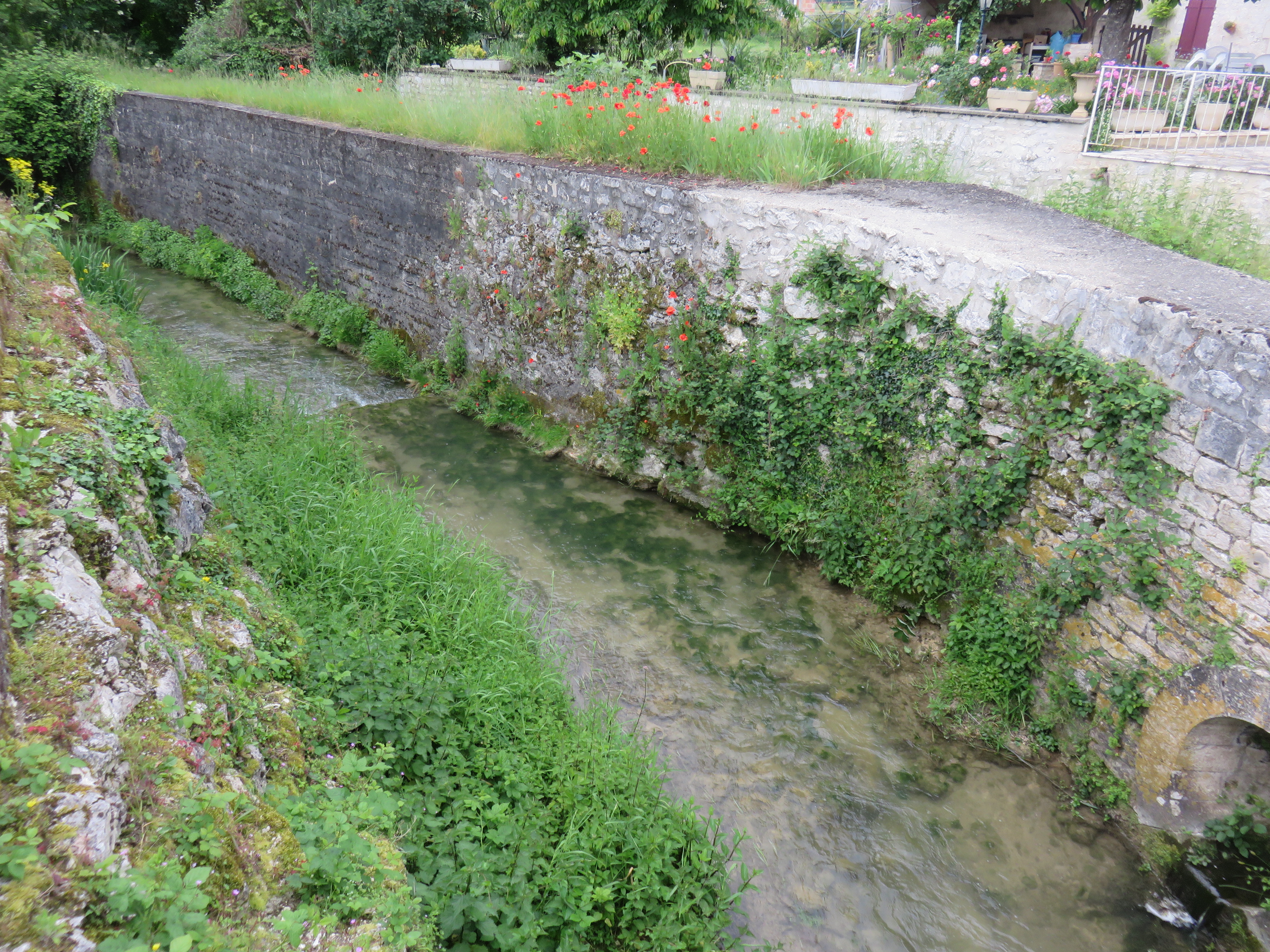 La Petite Barguelonne à Saint-Daunès (Lot, France).